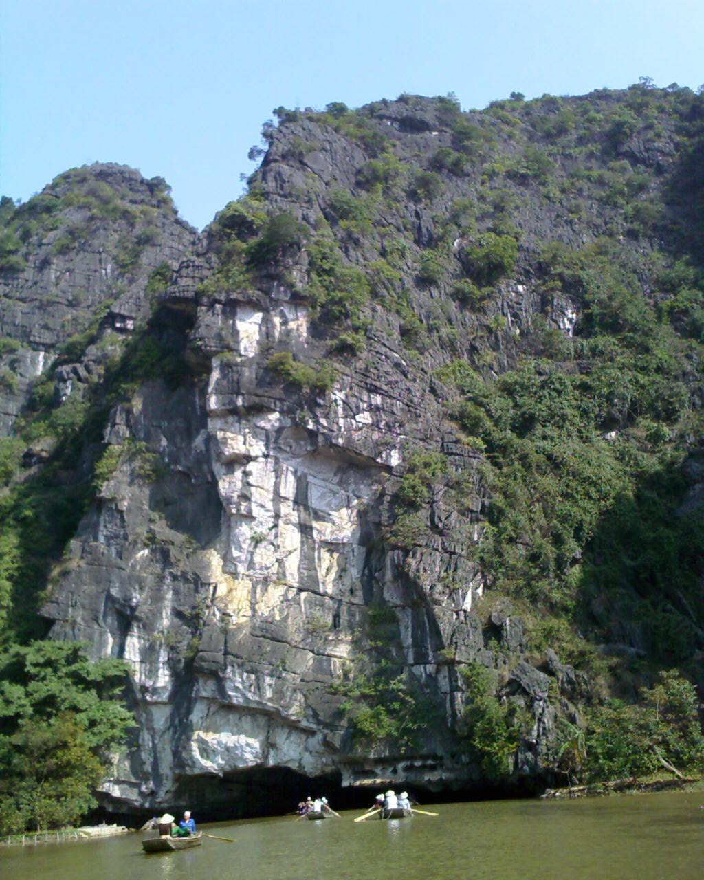 Tam Coc , Ninh Binh , Vietnam